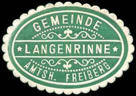 Sealing stamp Title: Gemeinde Langenrinne - Amtshauptmannschaft Freiberg Description: grün, weiß, geprägt Place: Langenrinne size: 3x4 cm